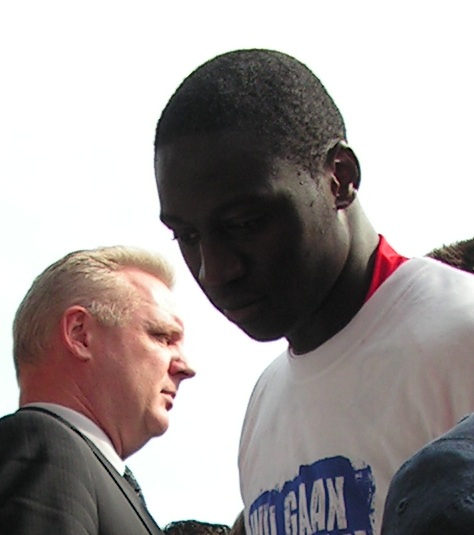 Zambiaans voetballer Jacob Mulenga na een wedstrijd van FC Utrecht